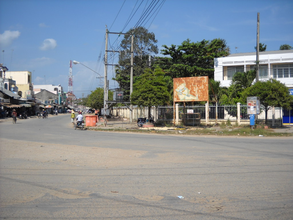 Thị trấn Cầu Kè, Trà Vinh